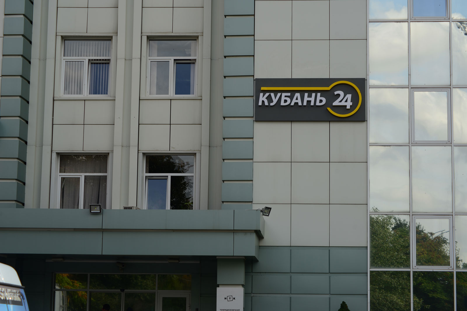 Здание телеканала «Кубань 24» в Краснодаре